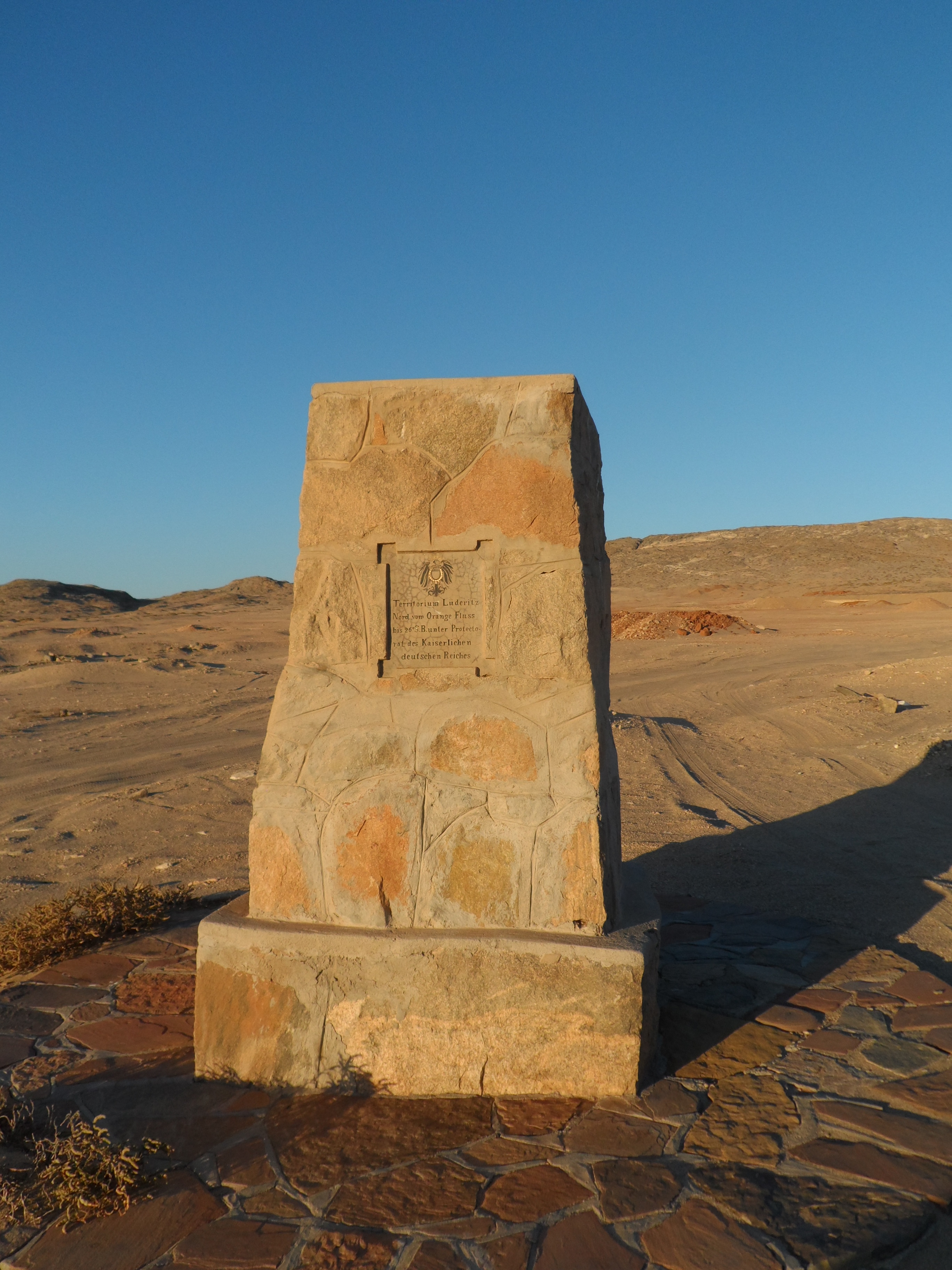 Lüderitz-Territorium-Denkmal in Lüderitz, Namibia, am nördlichen Ende der Industrie Straße, östlich von der Lüderitz Bay Cannery. Das früher auf dem Nautilus-Friedhof befindliche Denkmal (Lüderitz memorial) wurde am 15.3.1969 zum Nationaldenkmal erklärt. Da der Friedhof im Jahr 1977 aufgegeben wurde, wurde dieses Denkmal an die heutige Stelle vverlagert und zusammen mit 5m umgebenden Landes am 10.6.1980 erneut zum Nationaldenkmal erklärt.